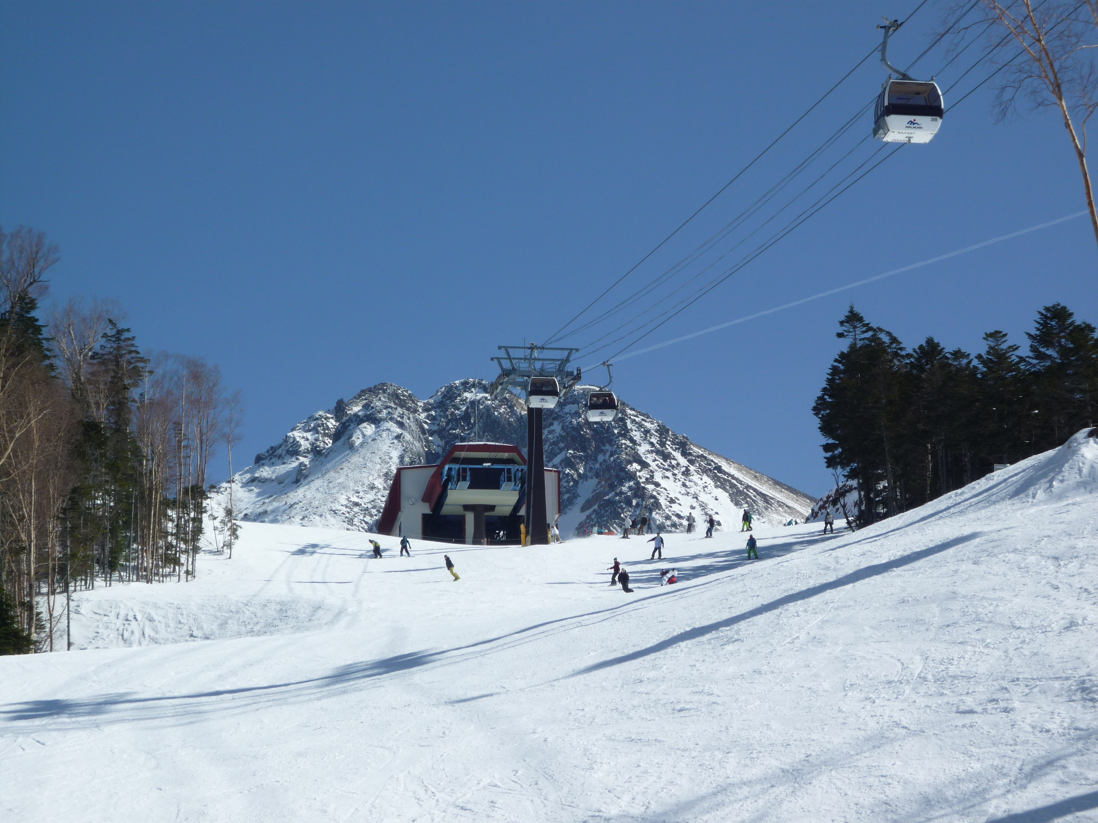 Malnuma Kougen Ski Resort and Mt. Nikkō-Shirane in Katashina, Gunma, Japan.